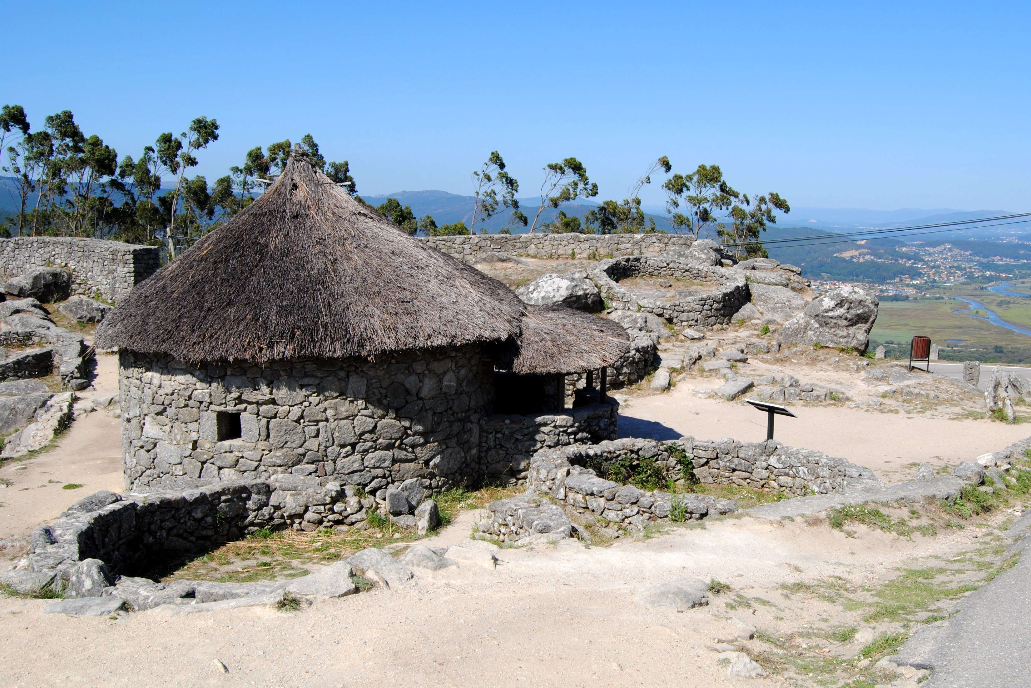 Castro de Santa Trega, 2011, A Guarda.